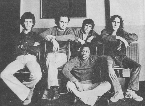 Grupo Raices, Cuadro, Bengolea, Andres Calamaro, Beto Satragni y Jimmy Santos.